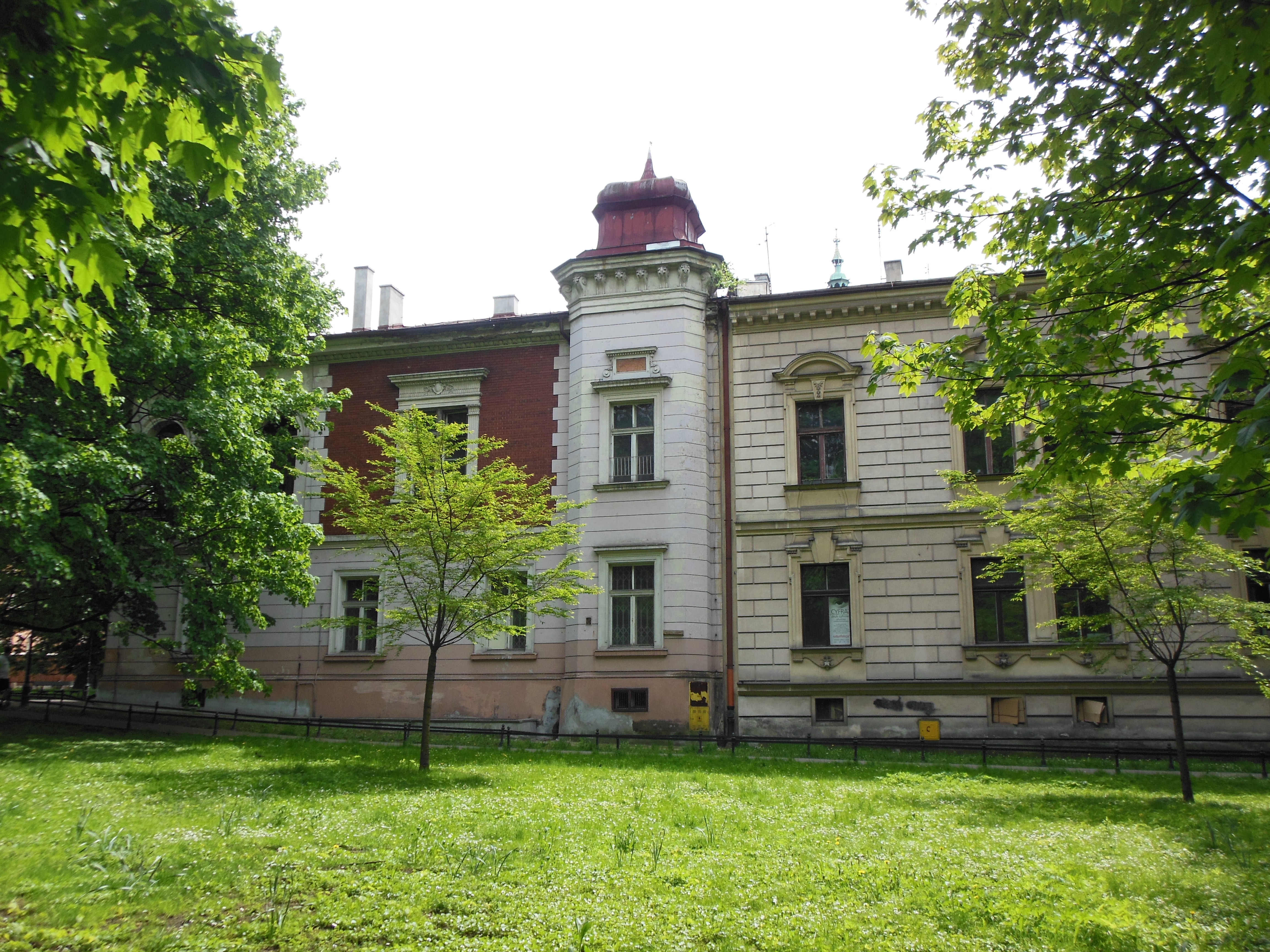 Willa "Mały Wawel" pod Wawelem na ul. Podzamcze 10 w Krakowie.